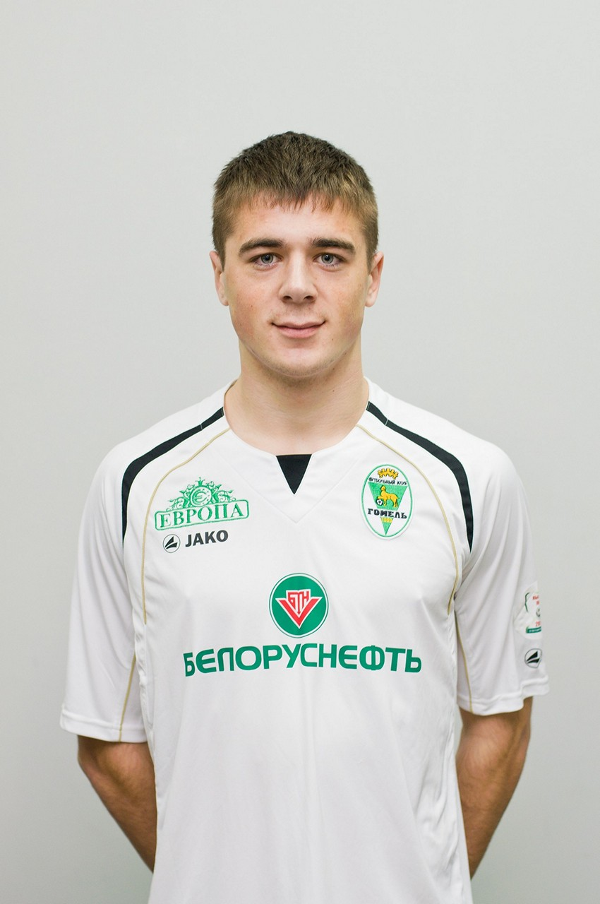 Александр Карницкий